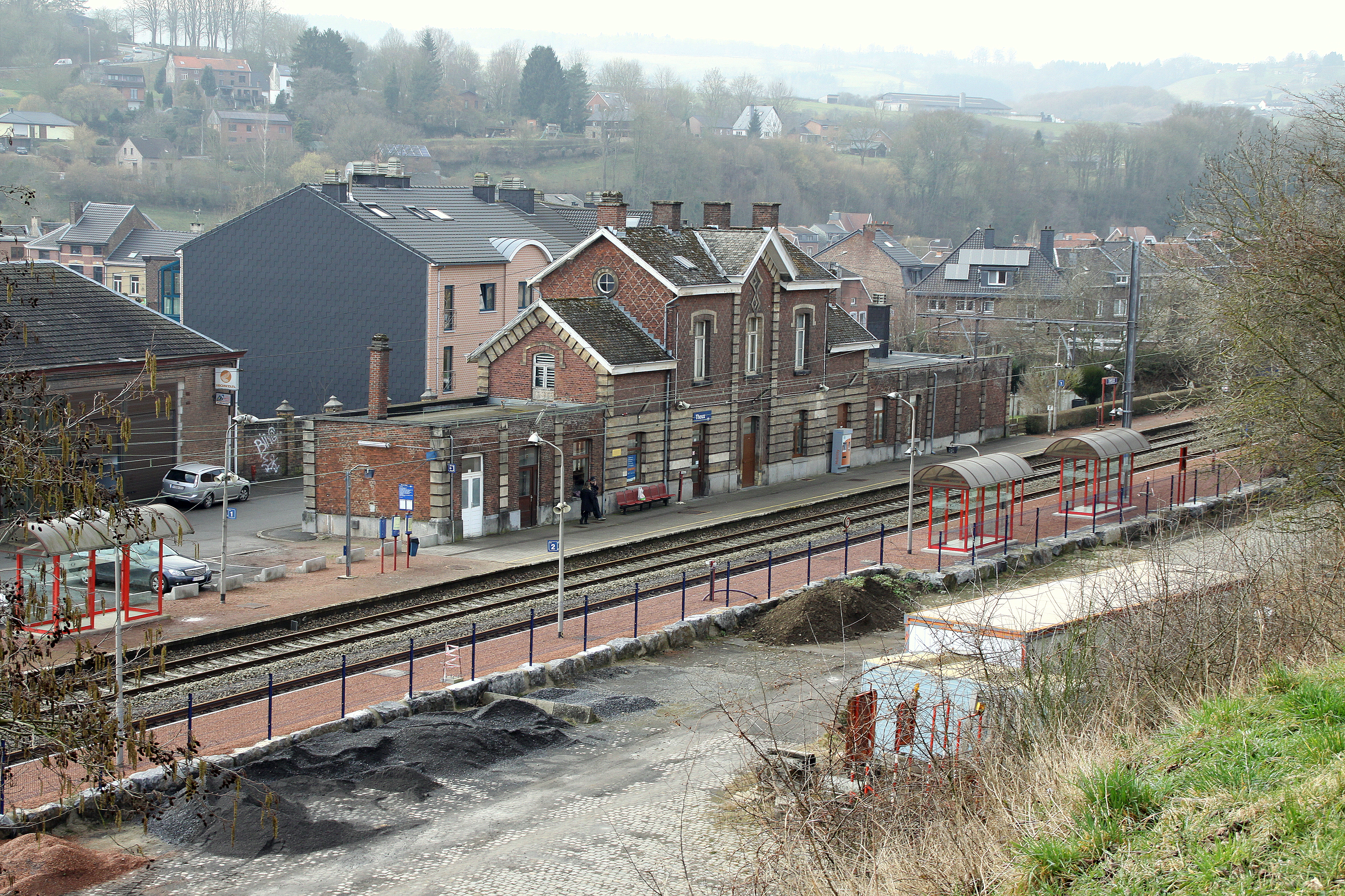 Gare vun Theux